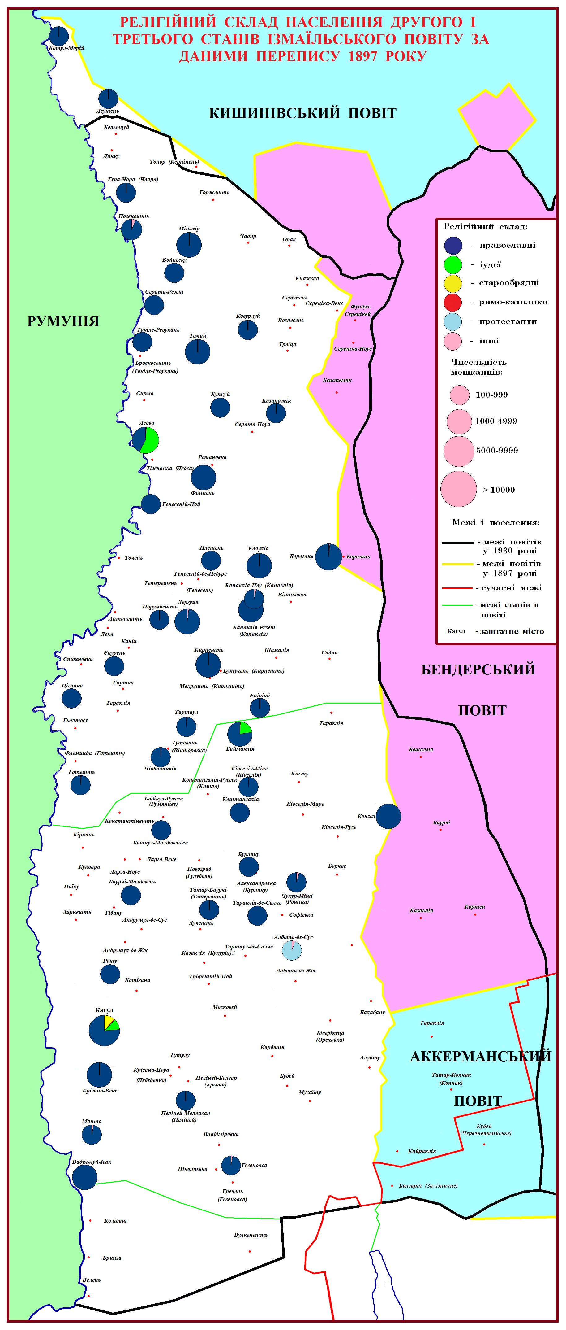 карта за даними перепису 1897 року